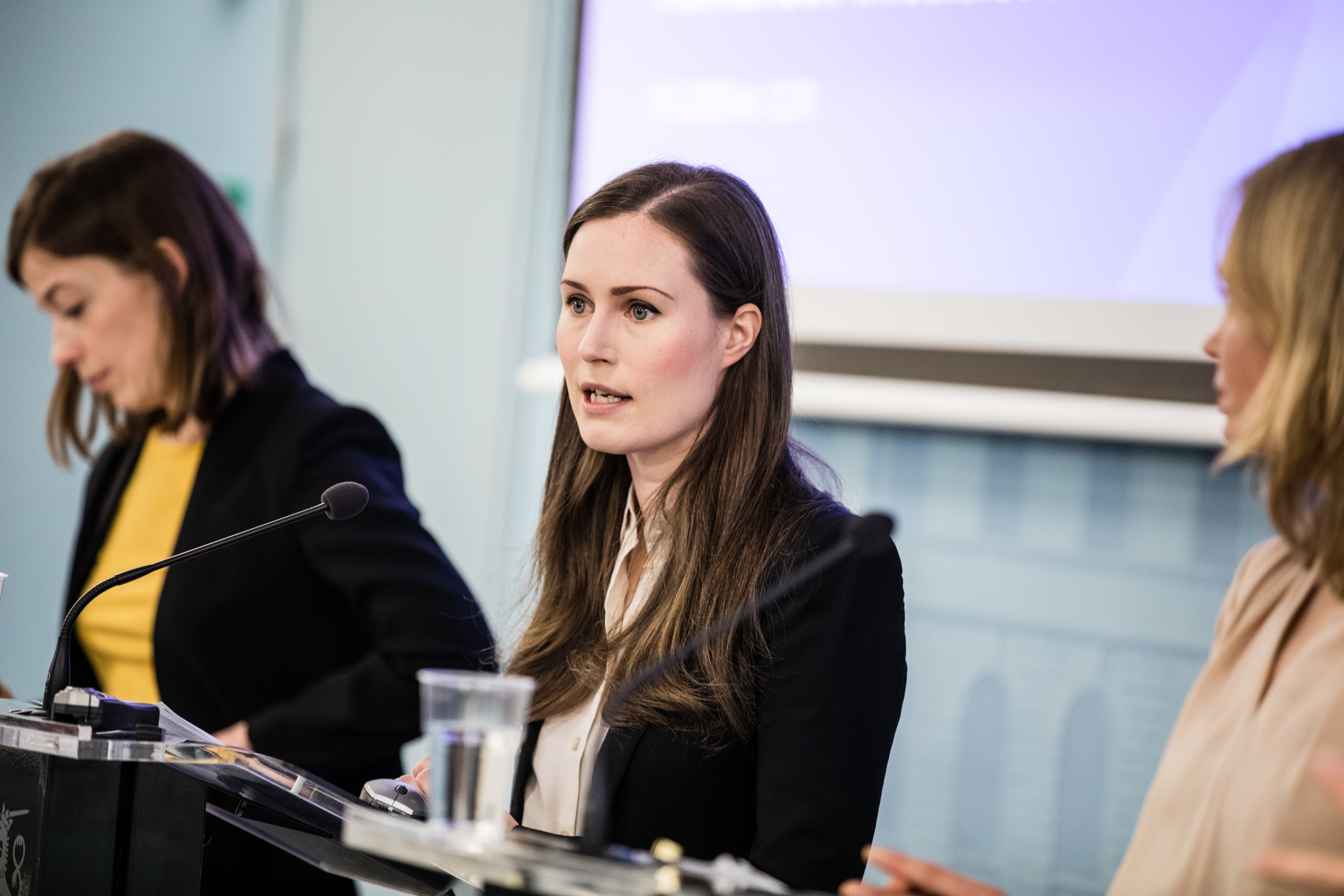 Pääministeri Sanna Marin, opetusministeri Li Andersson ja tiede- ja kulttuuriministeri Hanna Kosonen järjestivät infotilaisuuden 18.3.2020. © Laura Kotila | valtioneuvoston kanslia